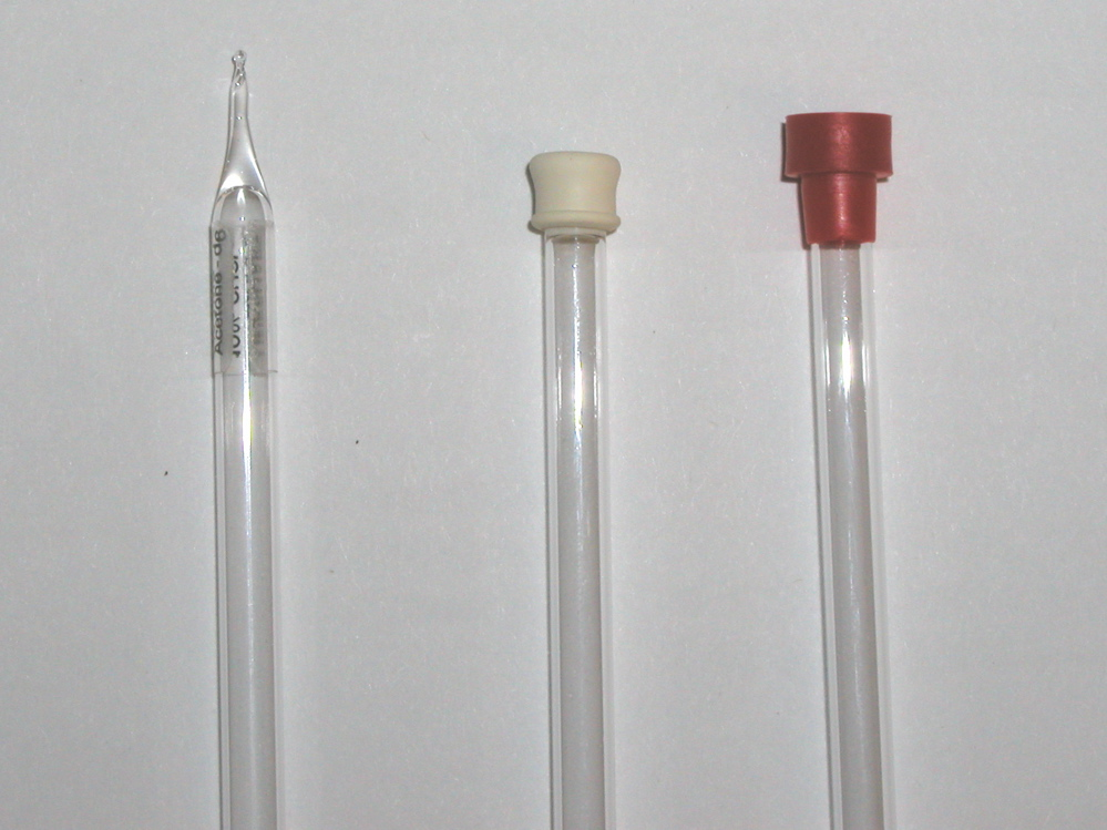 Laboratory equipment: NMR tubes